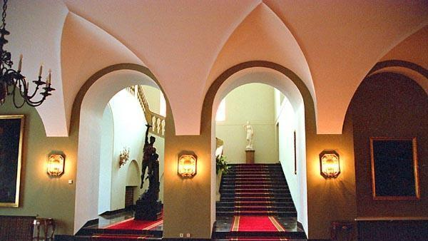 Warszawa (Polska)